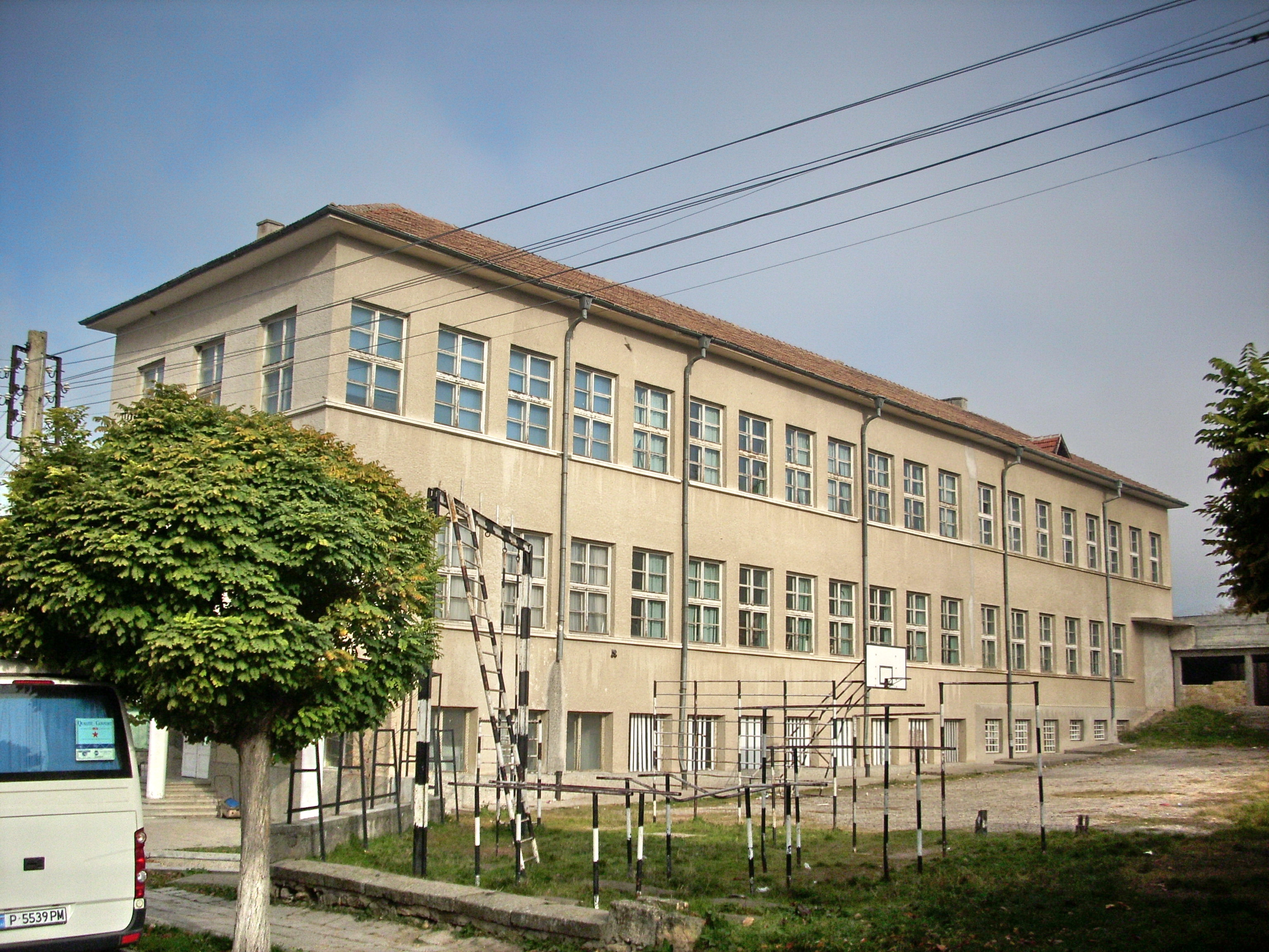 Село Зараево, община Попово. Основното училище (средищно)